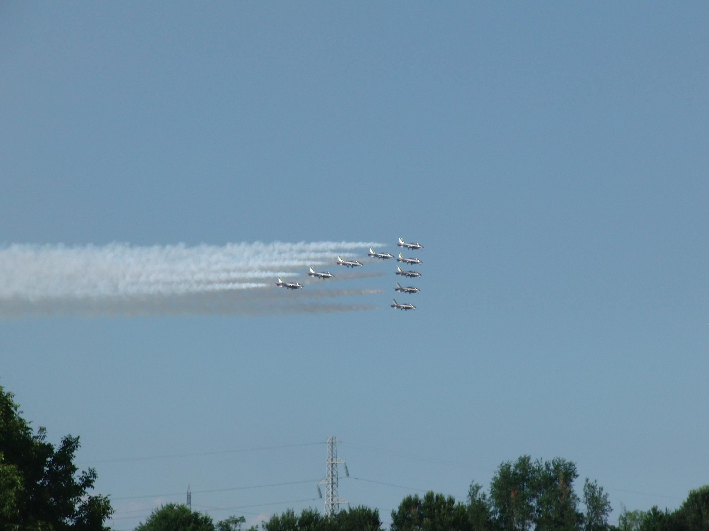 Saluto delle Frecce Tricolori al Centenario Aeroporto Torino Aeritalia 2016